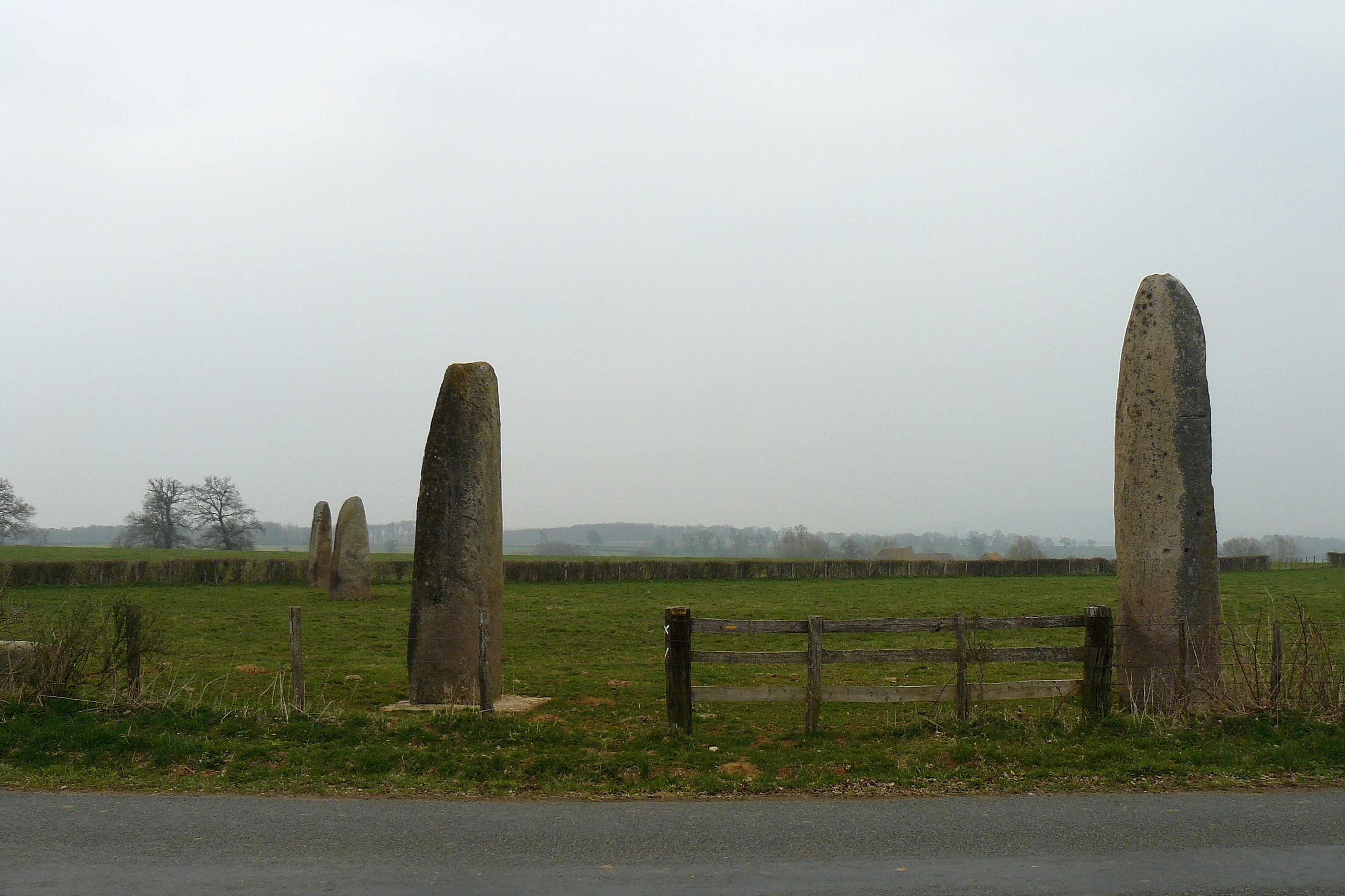 Les menhirs d'Epoigny (Couches, Saône-et-Loire)